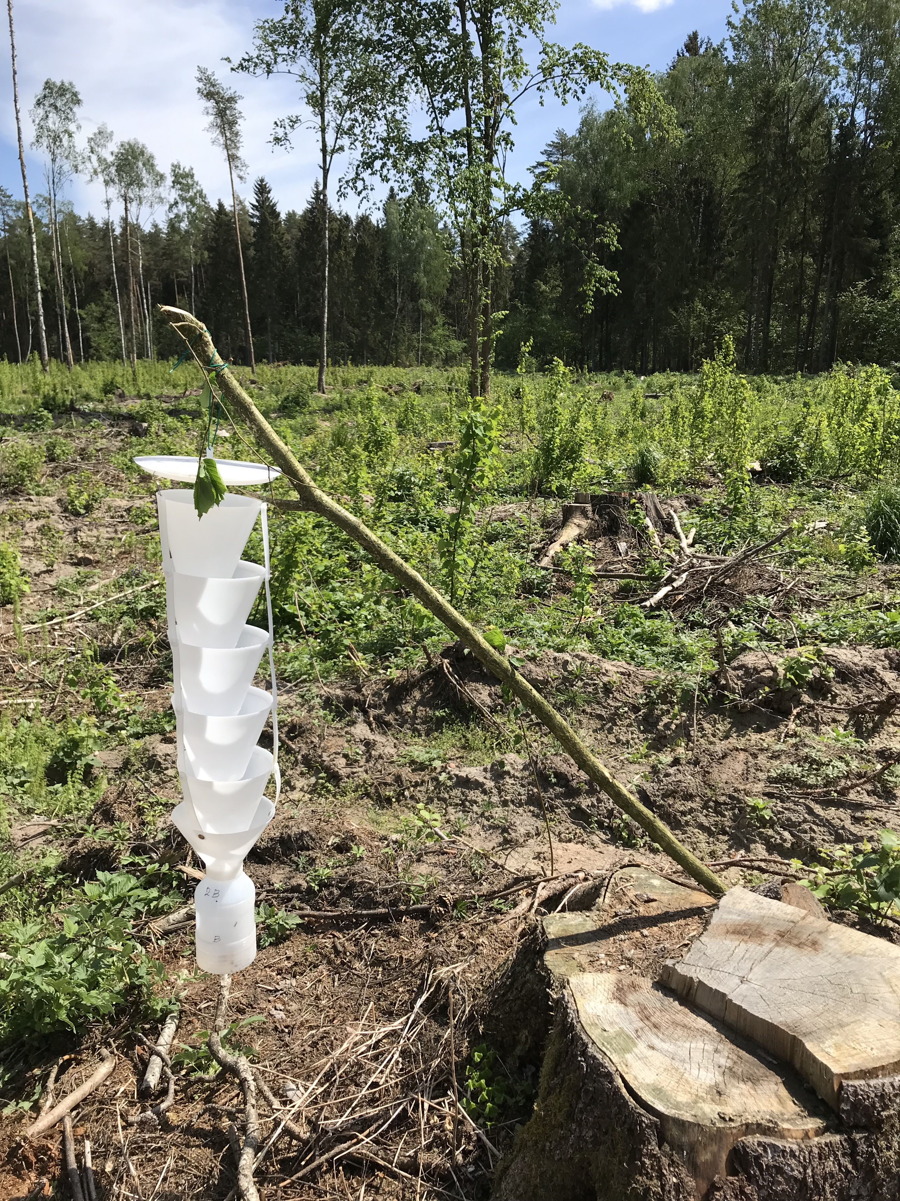 Žievėgraužių tipografų gaudymui paruošta feromoninė segmentinė gaudyklė. Vilniaus rajonas.